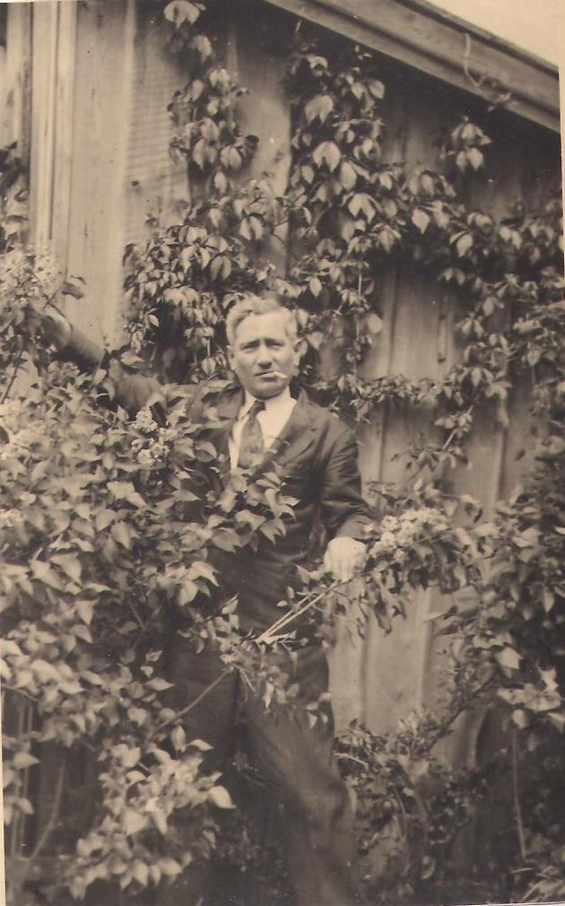 Zdjęcie burmistrza (II połowa l. 30.) przed domem.